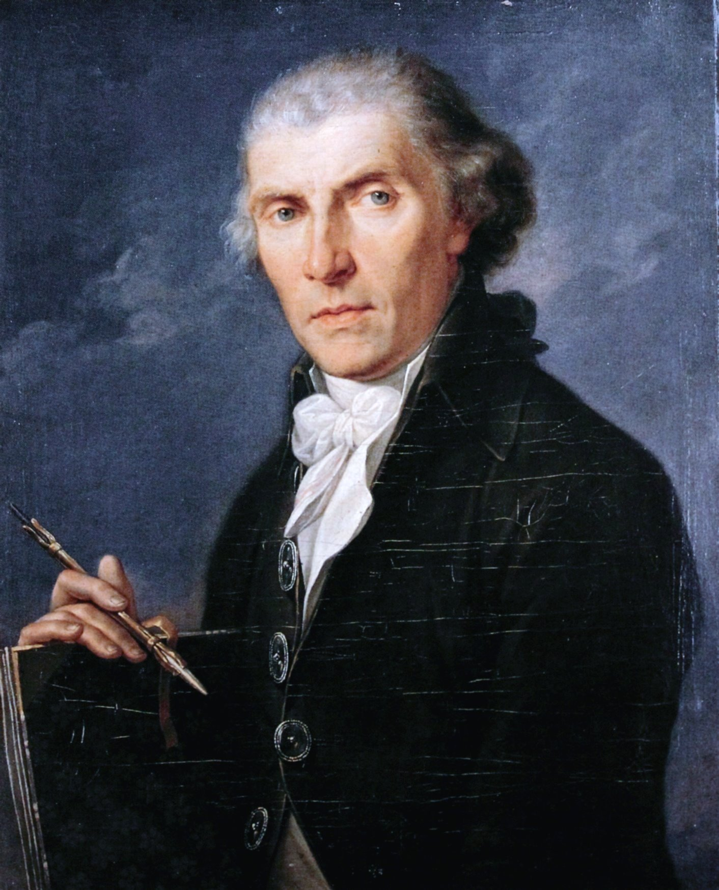 Bildnis des Vaters Johann Joseph Kauffmannlabel QS:Lde,"Bildnis des Vaters Johann Joseph Kauffmann"